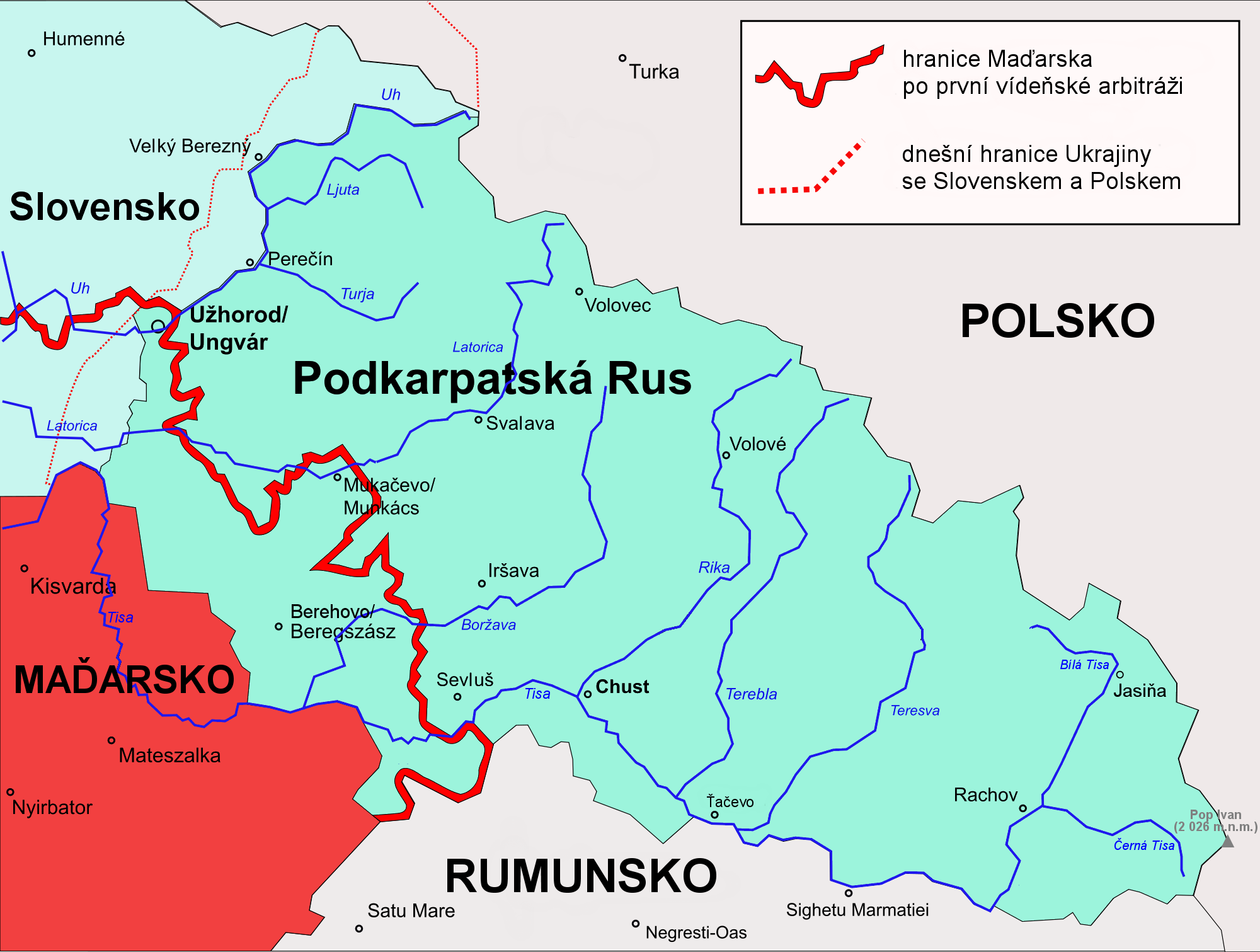 Mapa Podkarpatské Rusi a územních ztrát Československa na Podkarpatské Rusi v důsledku první vídeňské arbitráže.